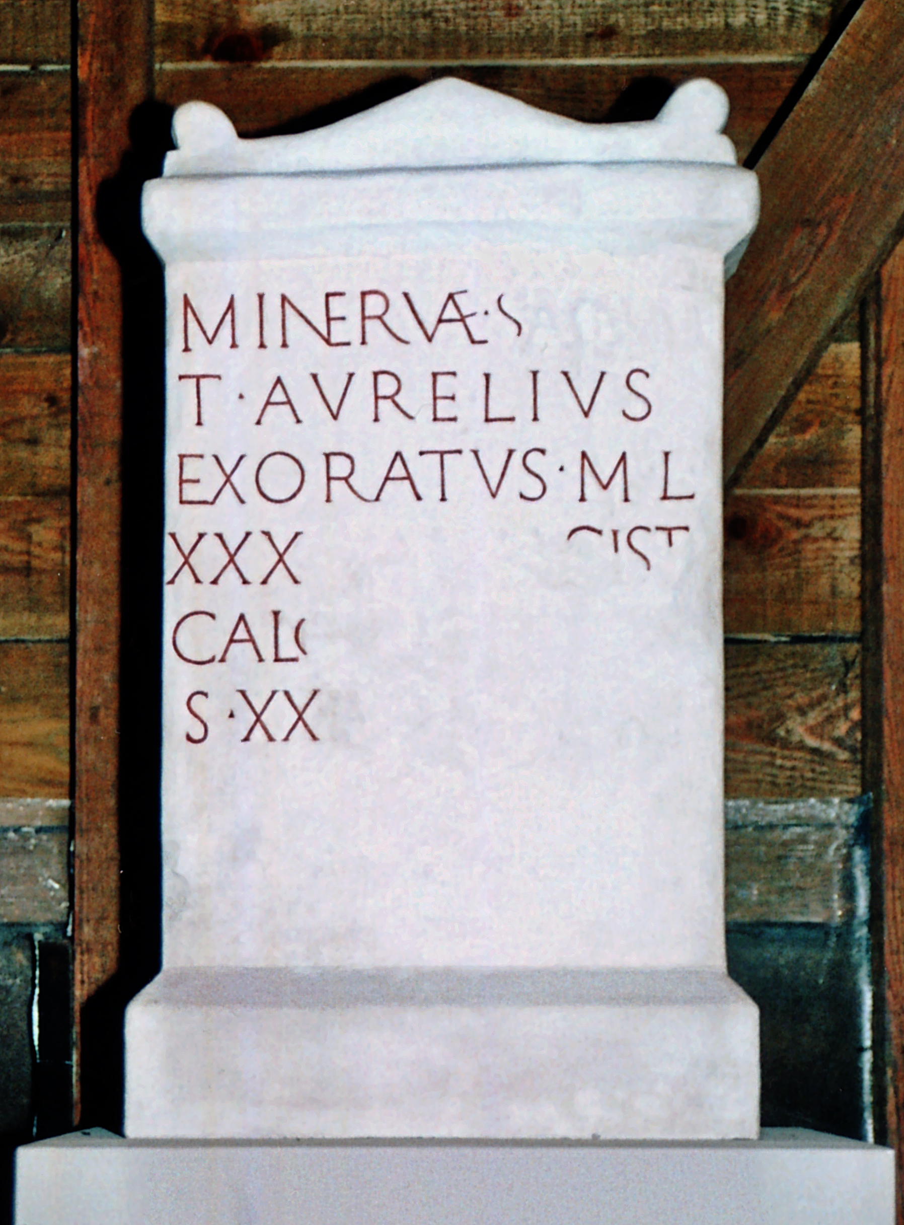 Restaurierter Altarstein des Titus Aurelius Exoratus aus der militäreigenen Kalkbrennerei Iversheim. NIBonn 00021 = AE 1977, 00558. Minervae sacrum T(itus) Aurelius Exoratus m(iles) l(egionis) XXX U(lpiae) V(ictricis) magist(er) calc(ariorum) [3] HS XXI |(semis?) [v(otum) s(olvit)] l(ibens) m(erito) Übersetzung: Der Minerva geweiht. Titus Aurelius Exoratus, Soldat der 30. Legion, der siegreichen ulpia, erfüllt als Meister der Kalkbrennerei gern sein Gelübde, weil die Göttin es verdient hat.